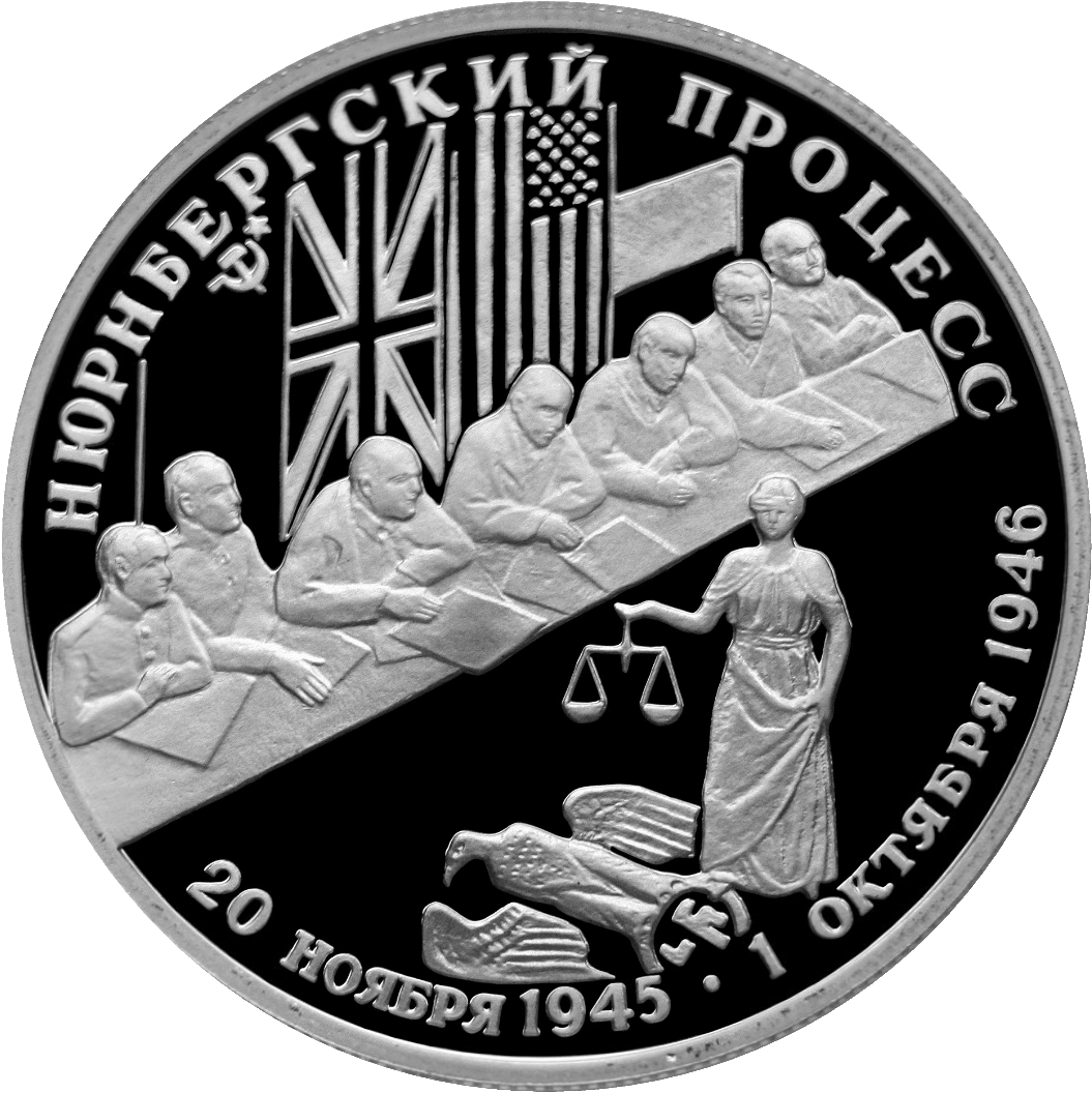 Монета Банка России — Серия: «Великая Отечественная война», 50-летие Победы в Великой Отечественной войне 1941—1945 гг., Нюрнбергский процесс, 2 рубля, реверс.